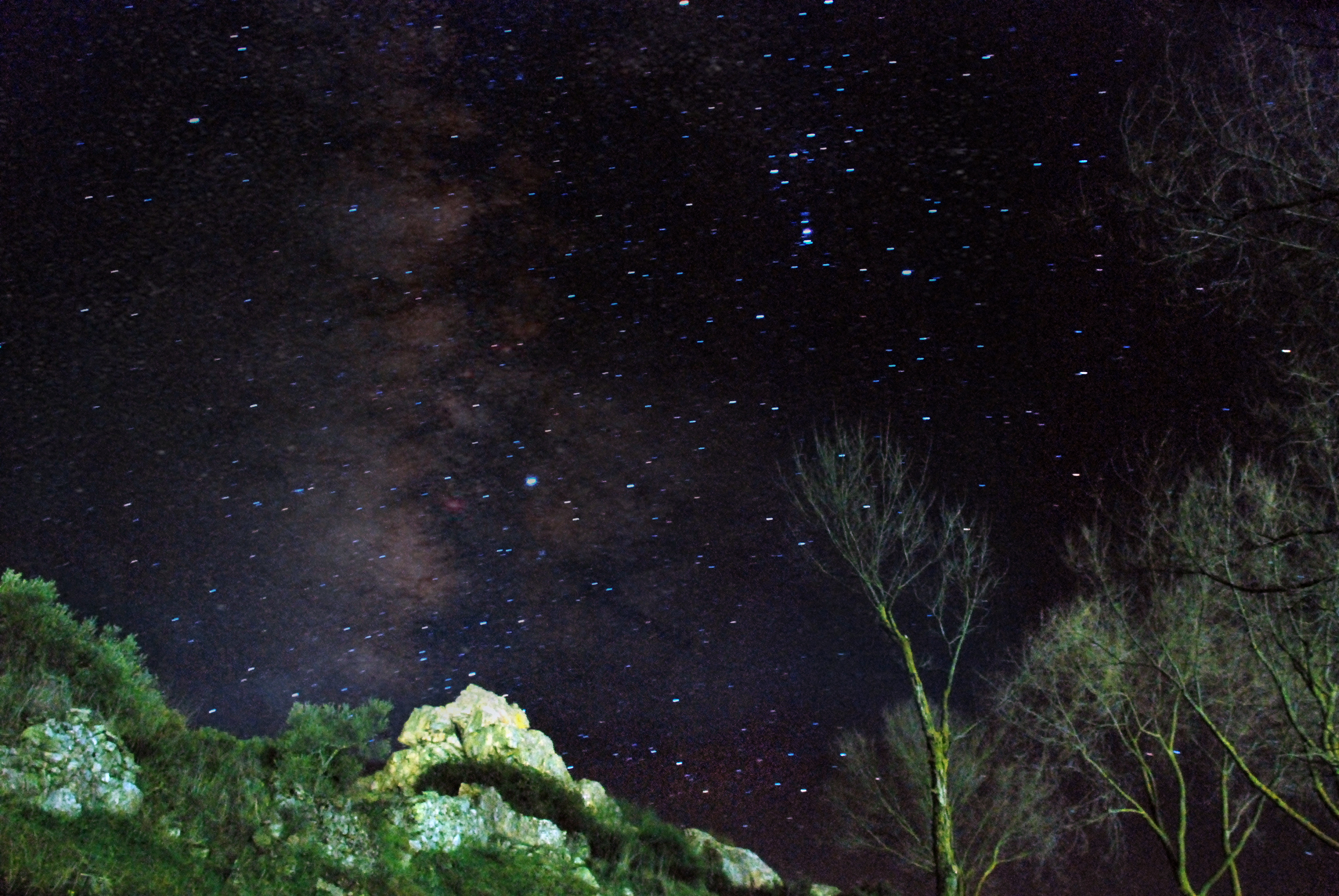 El cielo de Encinasola, pertenece a la Reserva Starlight de Sierra Morena, siendo este pueblo y su entorno el que debido a su localización disfruta de mejores condiciones óptimas para la observación.